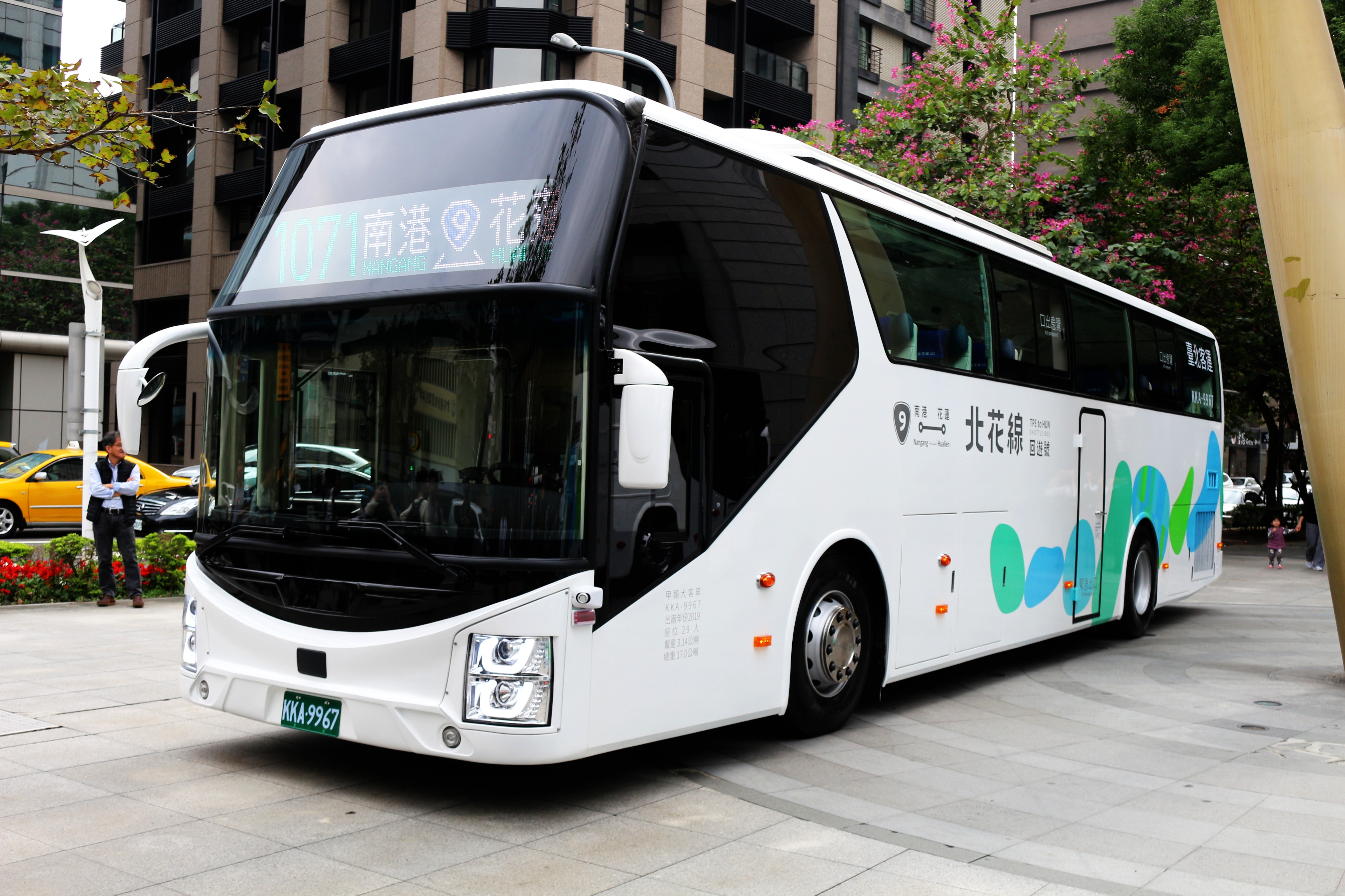 臺北客運 KKA-9967 1071 2019 SCANIA K410IB4X2NB